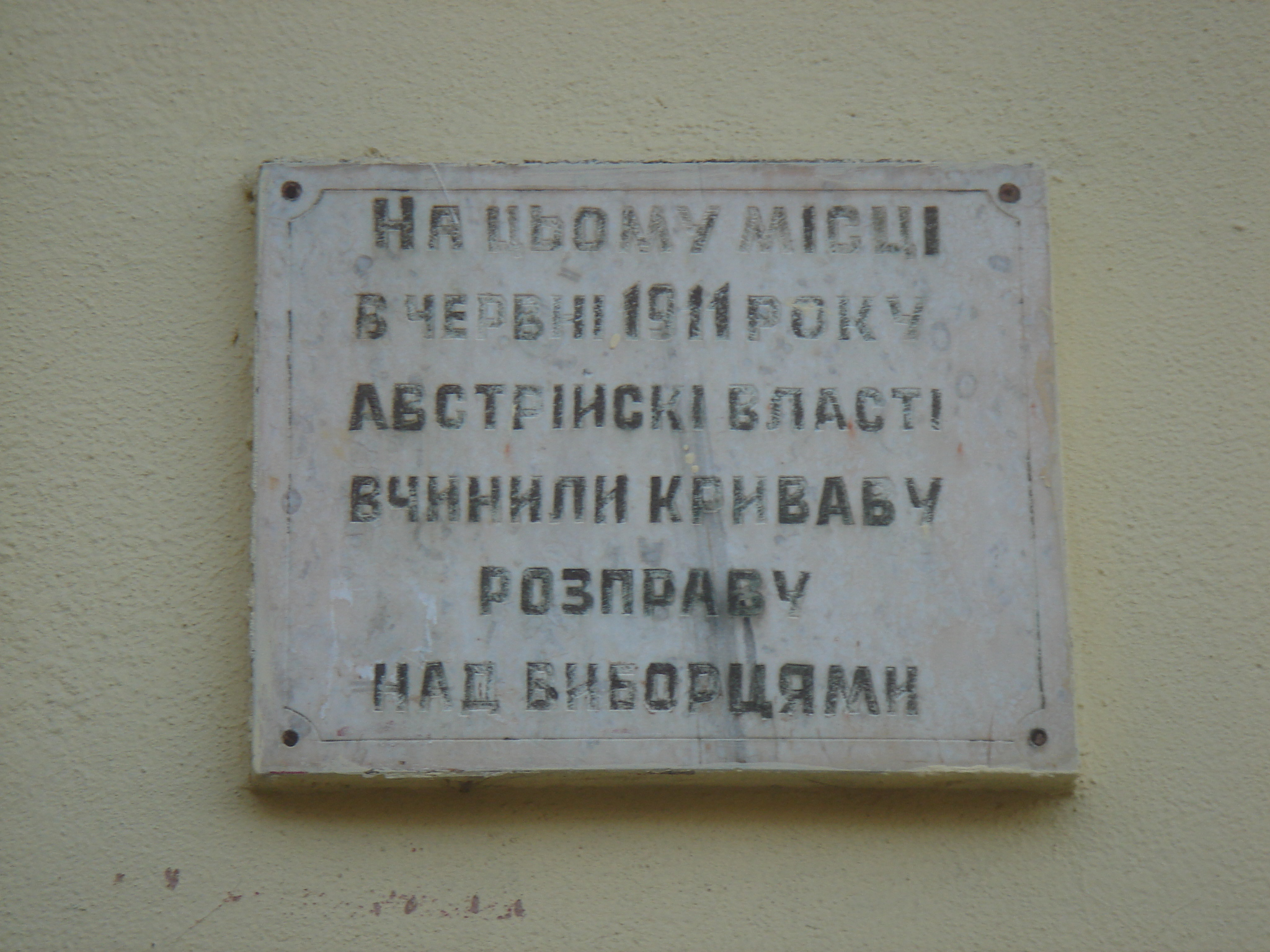 Місце, де австрійські власті вчинили криваву розправу над виборцями (мем. табл., 1969, мармур)., вул. І. Мазепи, 9 (на стіні зі сторони вул. Левицького)